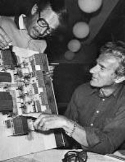 Sture Ljungqvist (till höger) med Jon Höjer.